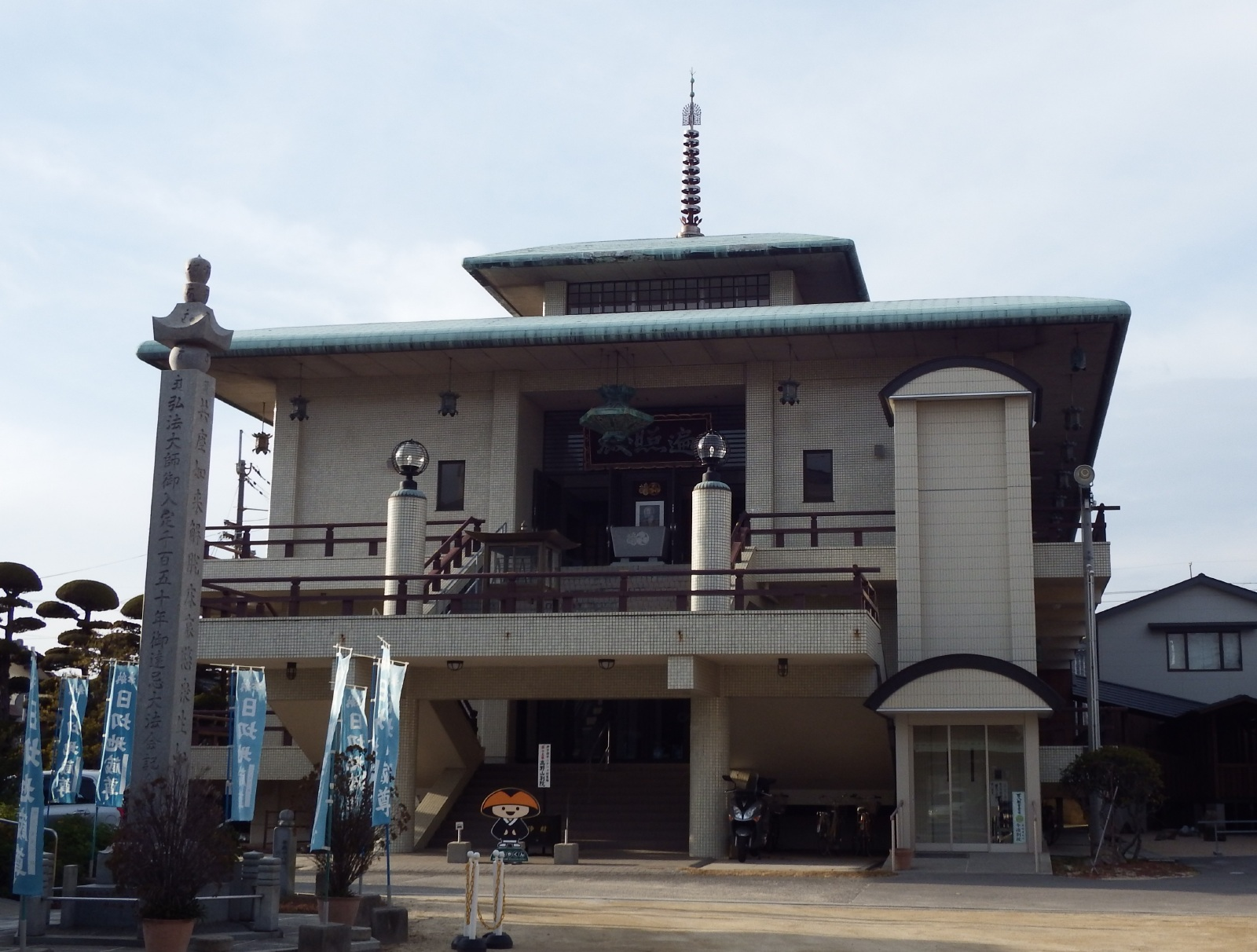 高野山別院今治の遍照殿